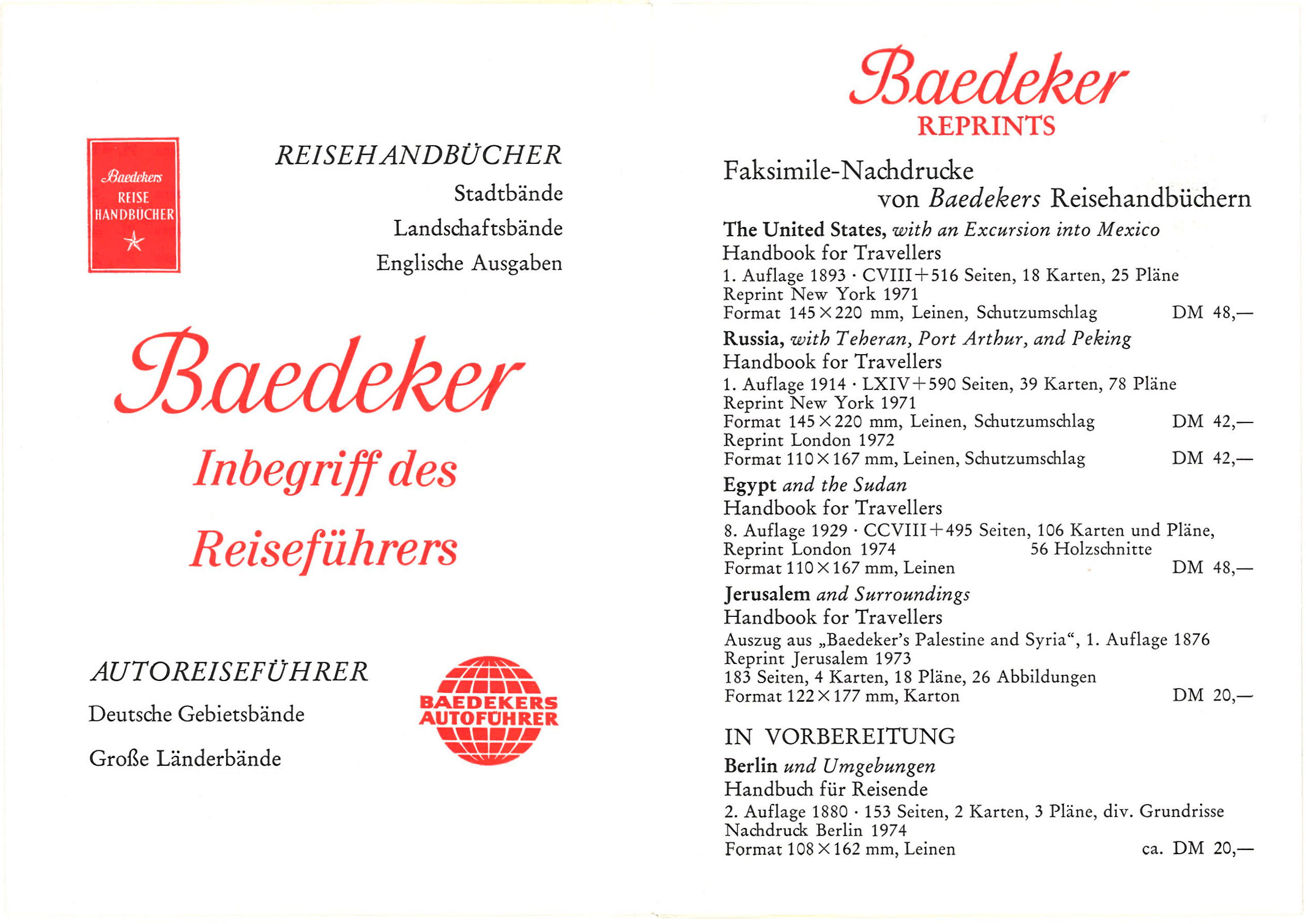 Baedeker-Gesamtverzeichnis 1974, Liste der Reprint-Ausgaben